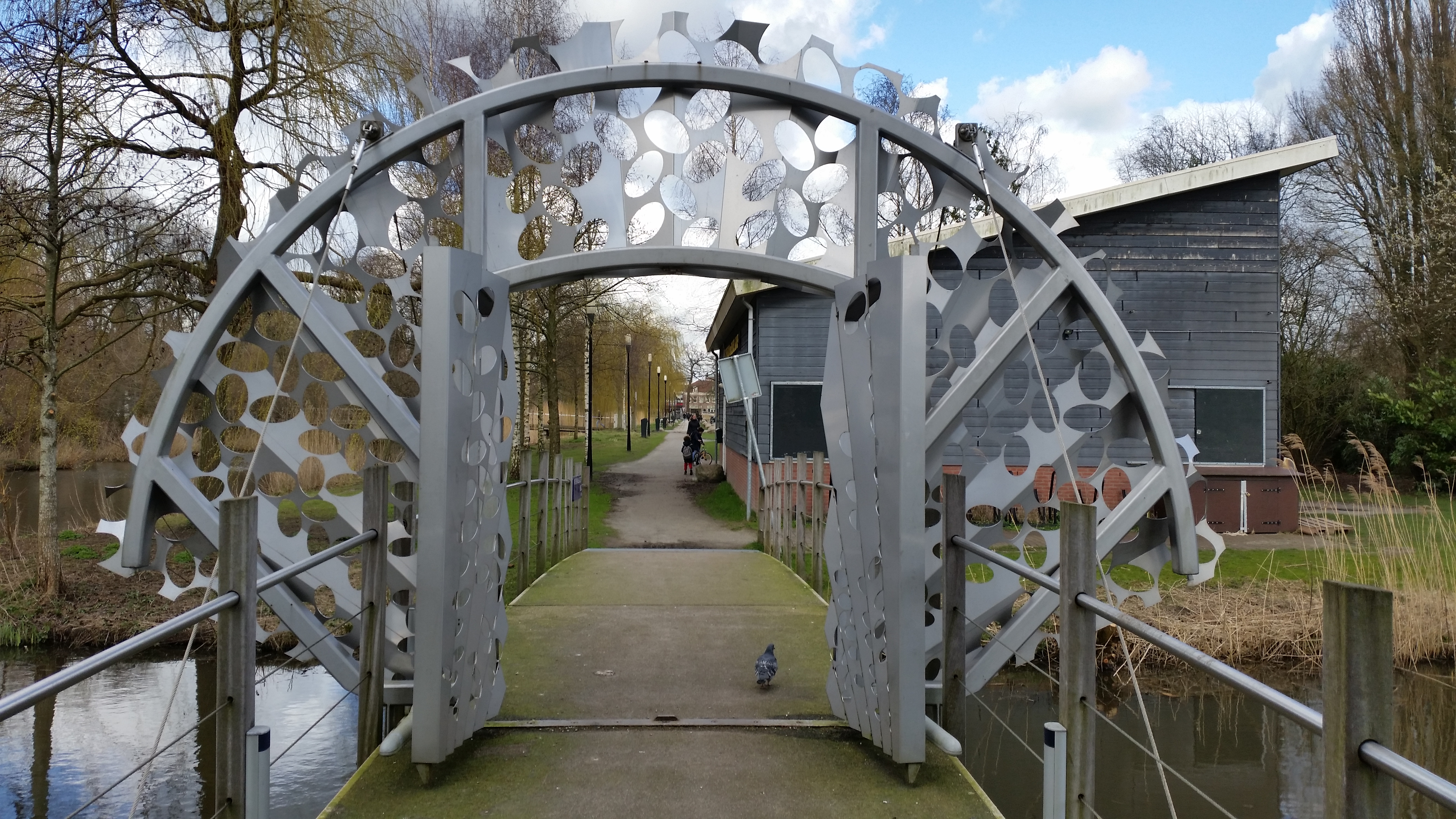 Impressie Van der Sande Lacostebrug in Park Frankendael (april 2020)